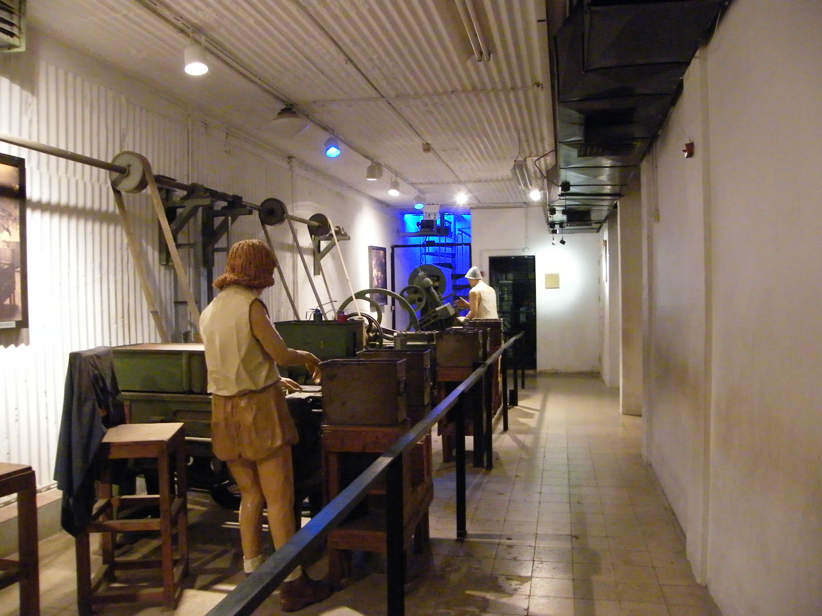 מכון איילון היה סליק ומפעל מחתרתי לייצור קליעים של ארגון ההגנה בגבעת הקיבוצים, השוכנת במבואותיה הצפוניים של העיר רחובות, בתקופת המנדט הבריטי.